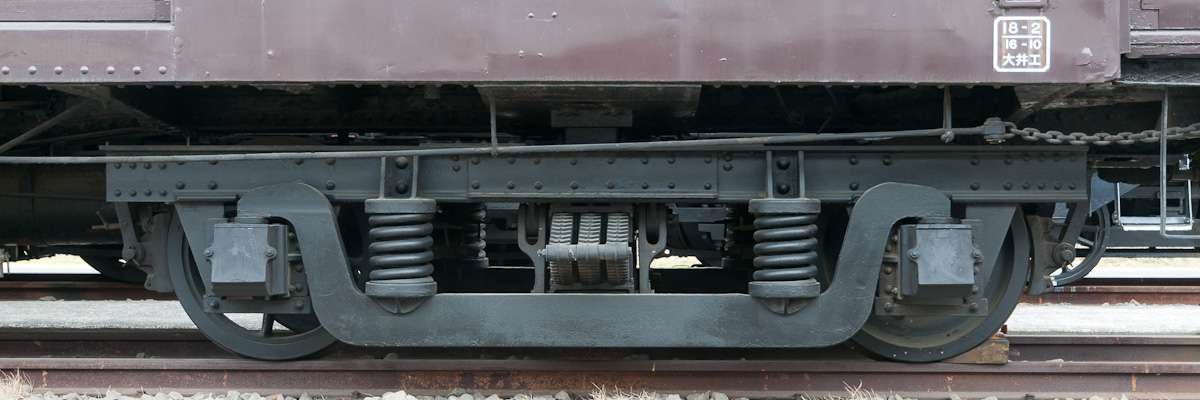 国鉄TR13形台車。碓氷鉄道文化村の保存車、スニ（スエ）30 8。